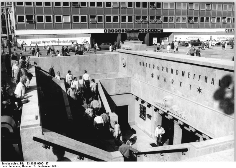 Leipzig, "Untergrundmessehalle Markt" ADN-ZB Lehmann 5.9.88 pe Leipzig: Herbstmesse 88- Die "Untergrundmessehalle Markt" wurde nach einer Rekonstruktion zur Herbstmesse wiedereröffnet. In der Eingangszone fallen die Orginalgetreuen Porphyrsäulen und die schmiedseisenrnen Lampen auf. Diese Halle war zur Frühjahrsmesse 1925 als erstes unterirdisches Messehaus der Welt eingeweiht worden. Heute werden auf der 1 600 Quadratmeter großen Ausstellungsfläche Jagd- und Sportwaffen aus der DDR sowie Erzeugnisse der Besen-, Bürsten- und Pinselindustrie gezeigt.